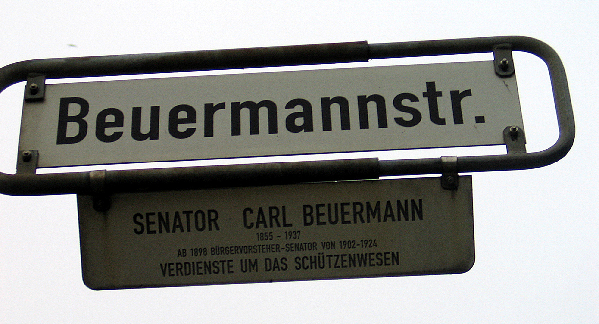 Straßenschild der Beuermannstraße an der Legionsbrücke, zwischen der Ihme und dem Schützenplatz; Abschrift: "Senator Carl Beuermann, 1855 - 1937, ab 1898 Bürgervorsteher-Senator von 1902 - 1924, Verdienste um das Schützenwesen" ...